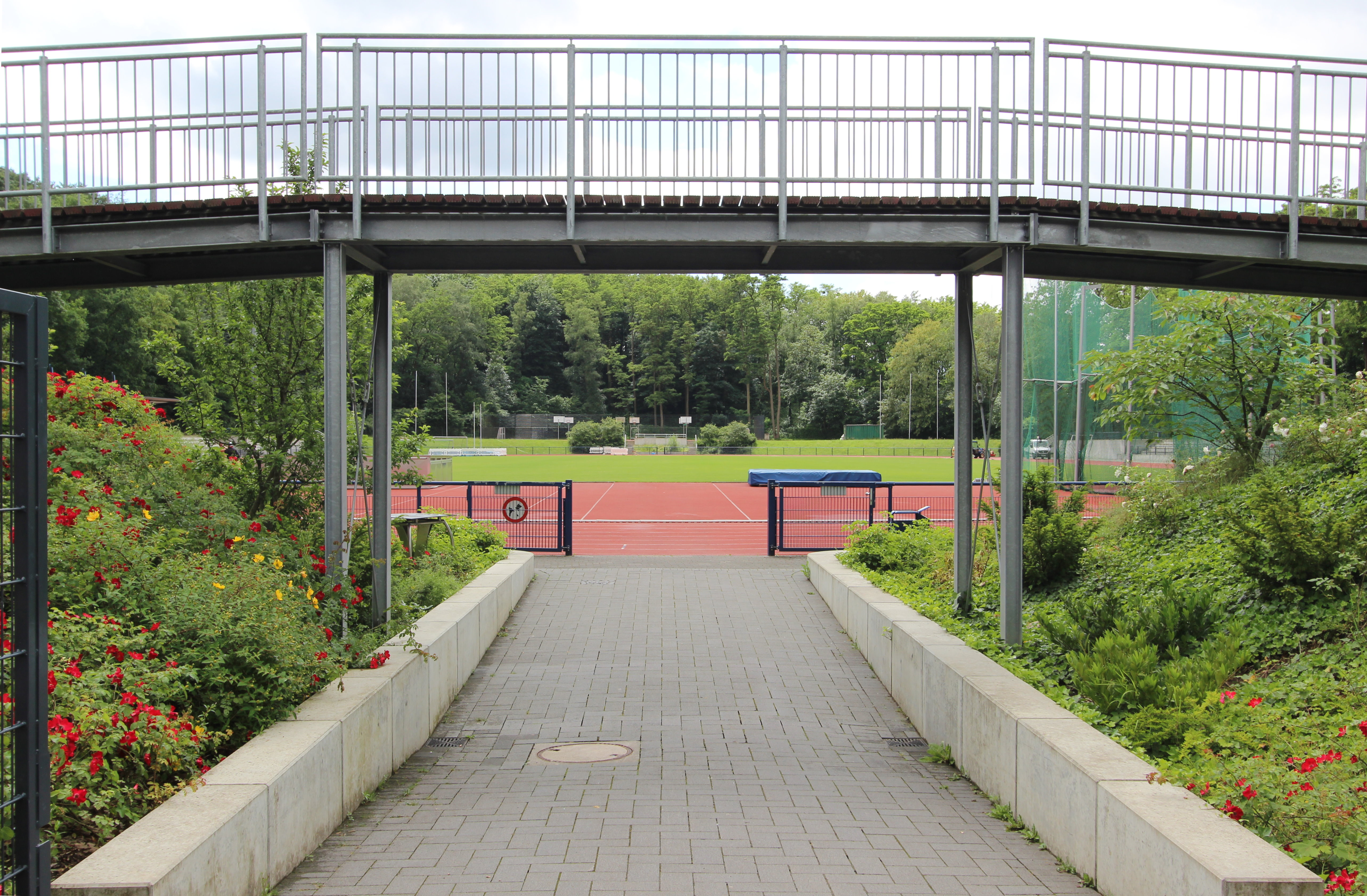 Rather Waldstadion Wilhelm-Unger-Str. 5 in 40472 Düsseldorf. Aufnahme aus Nord-Osten von 2016.